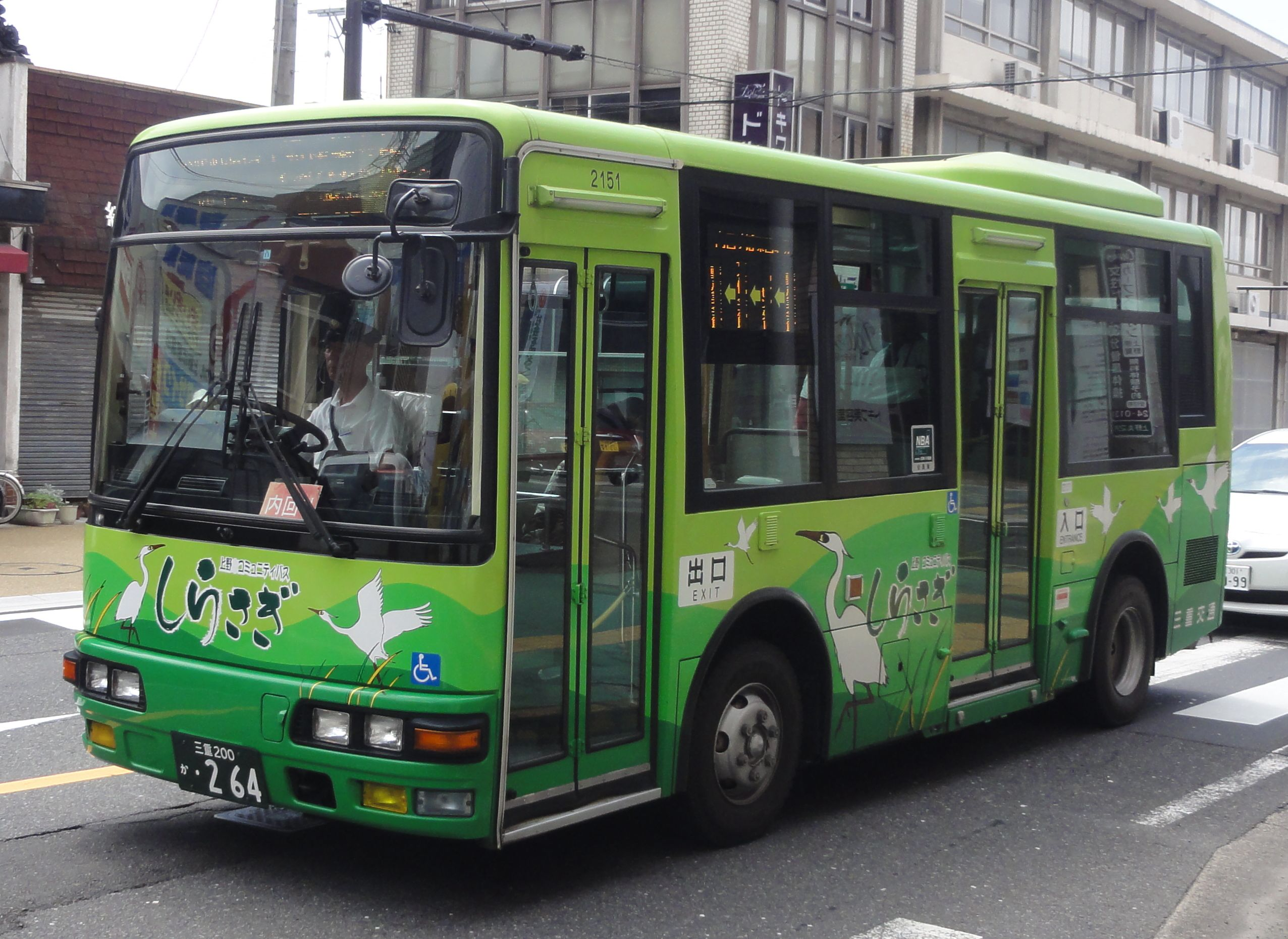 三重交通 上野コミュニティバス